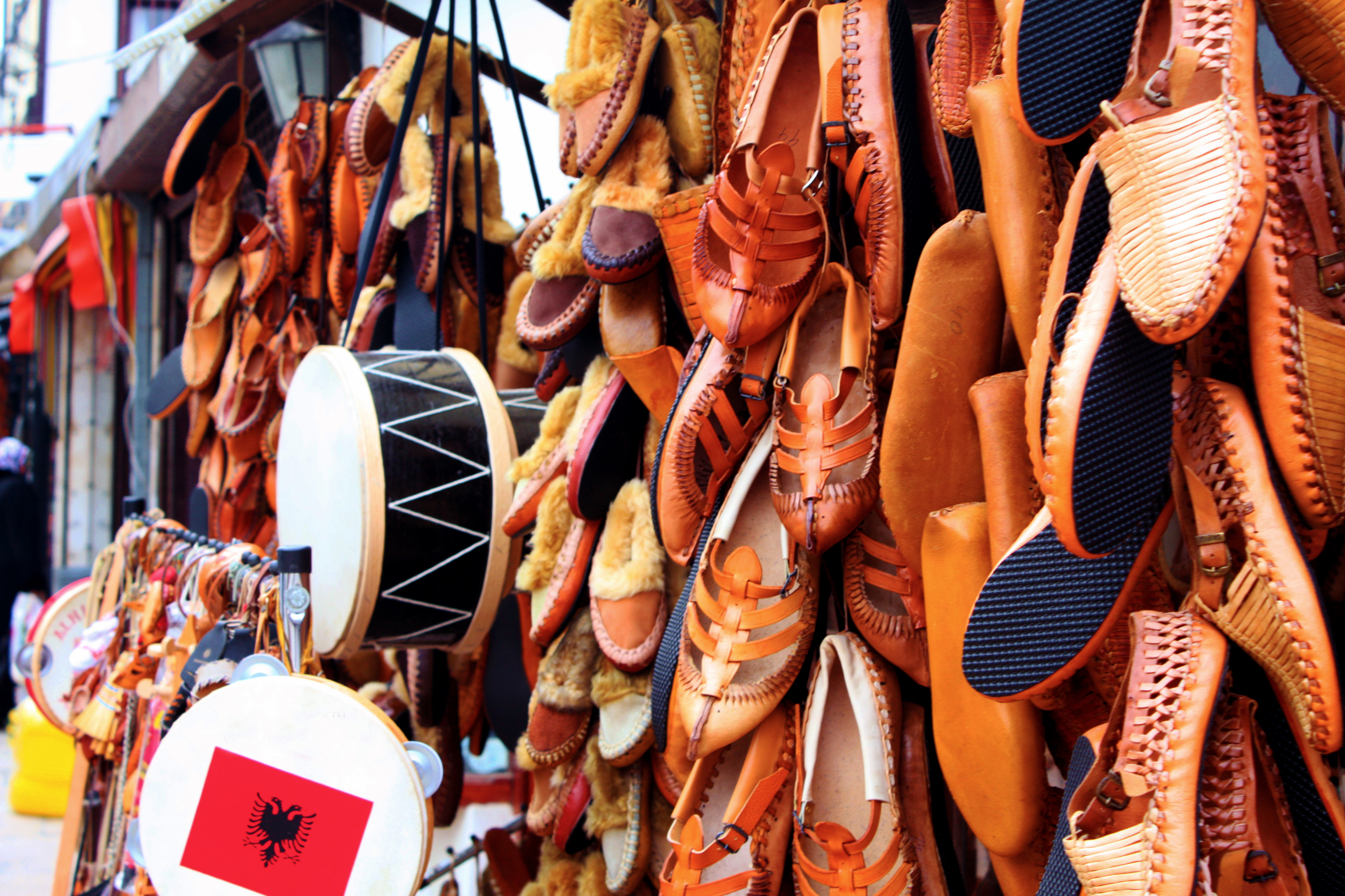 Kjo foto eshte bere ne Ferizaj/Kosove, ne tregun e qytetit,ktu paraqiten disa kepuce tradicionale shqiptare te quajtura "Opinga"